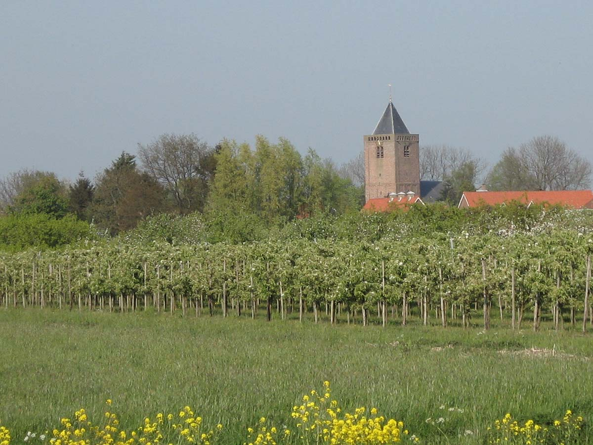 Schoonrewoerd